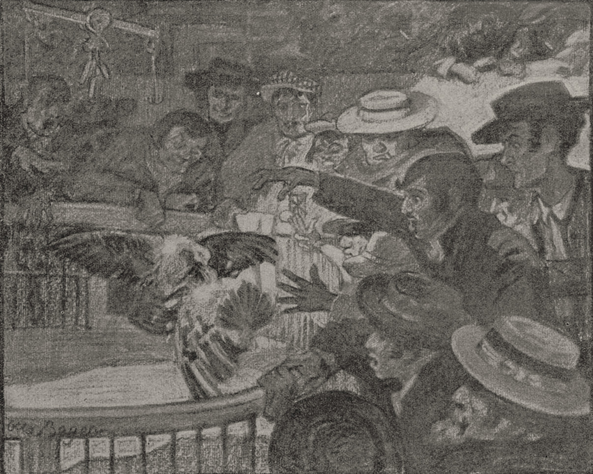 Hahnenkampf in Spanien. Zeichnung von Otto Boyer (ohne Datum)